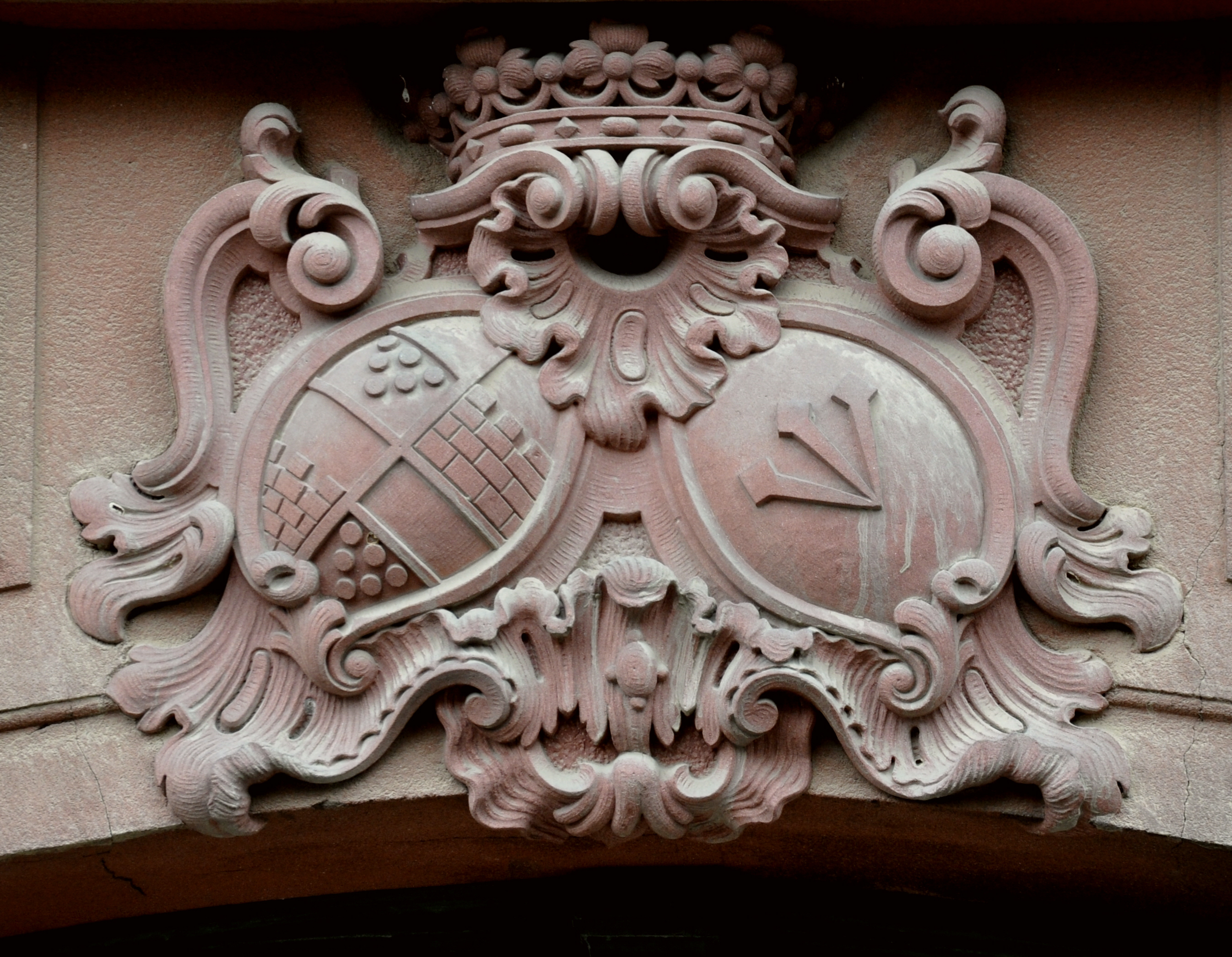 Kiedrich, Schloss Groenesteyn, Wappenrelief mit Allianzwappen Carl Adolph Friedrich Constantin Philipp Freiherr v. Ritter zu Grünstein (1830-1895), und seine 1861 geehelichte Frau Maria Isabelle Wilhelmine Georgine Luise Elise von Preen (1843-1922); siehe auch